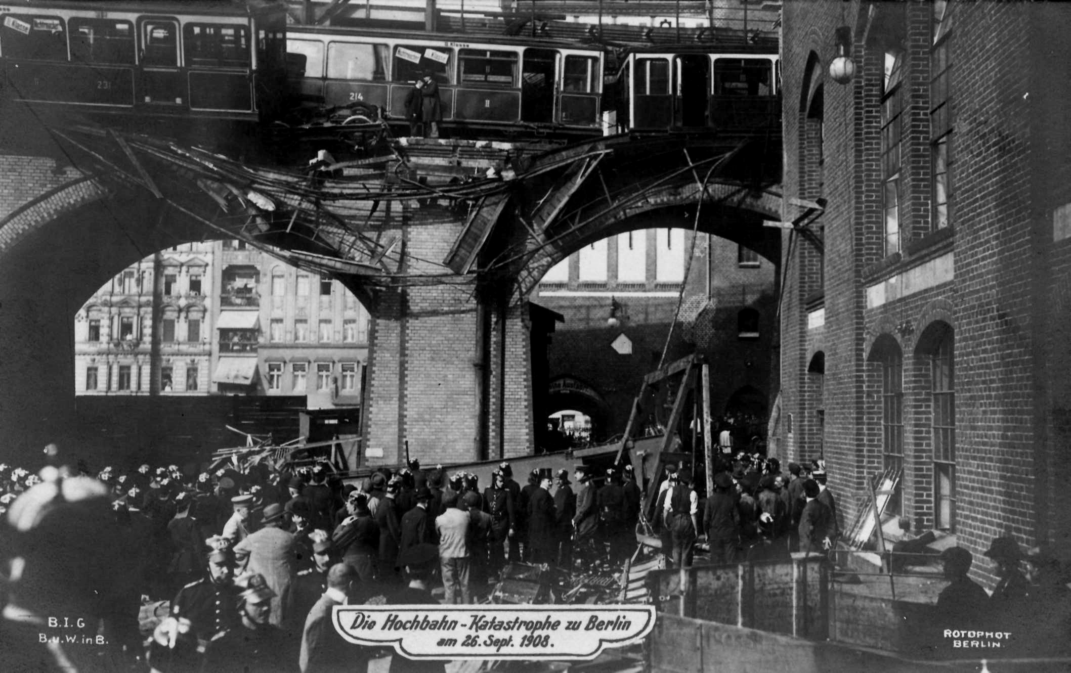 Hochbahnkatastrophe am Gleisdreieck am 26. September 1908 in Berlin-Kreuzberg. Ein U-Bahn-Zug fuhr einem anderen Zug in die Flanke und drückte zwei Wagen aus dem Gleis. Einer der Wagen stürzte dabei vom Viadukt. 21 Fahrgäste kamen ums Leben. Daraufhin wurde ein Umbau des Gleisdreiecks angeordnet.